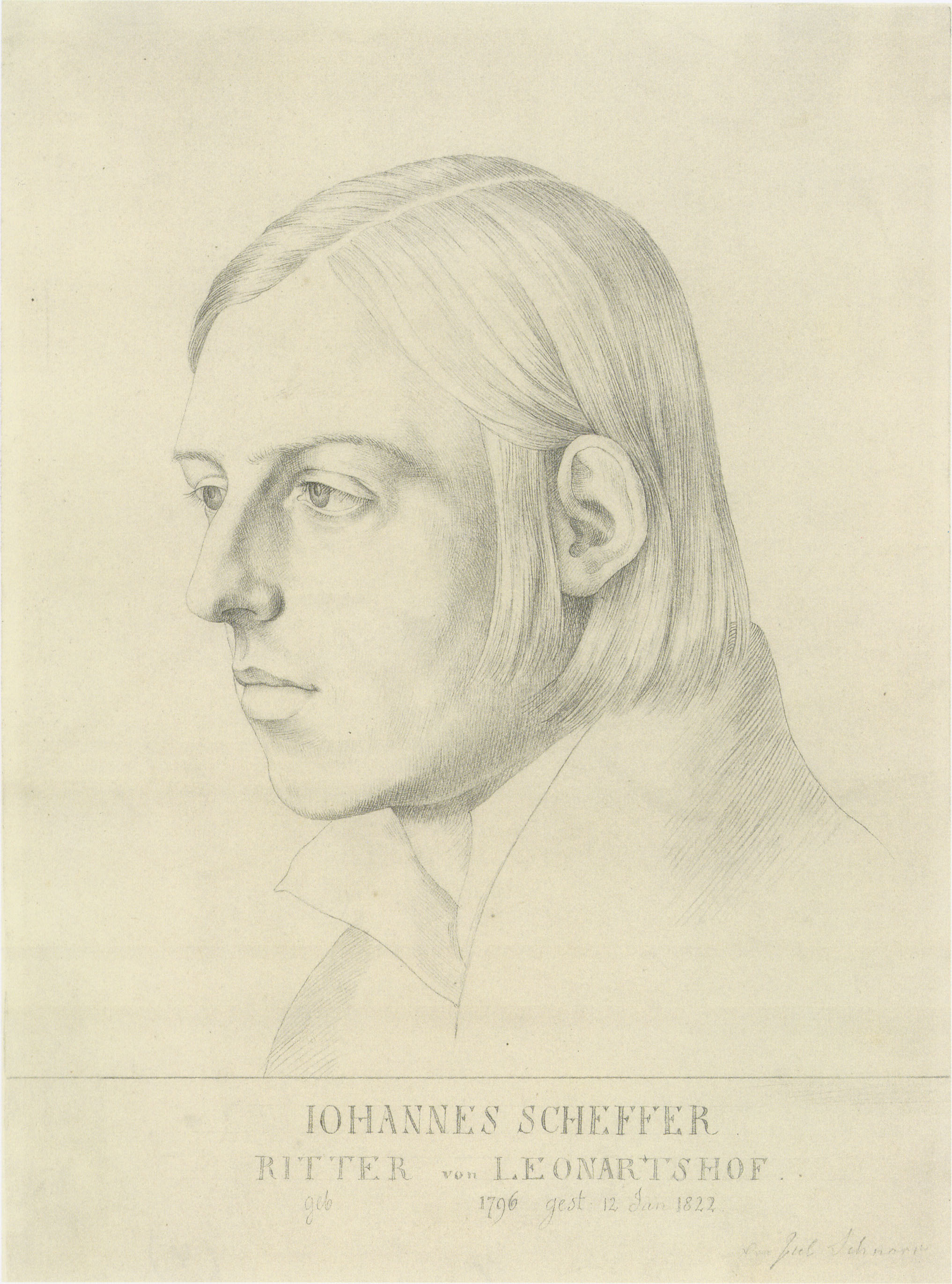 Bildnis des Johann Evangelist Scheffer von Leonhardshoff, um 1822